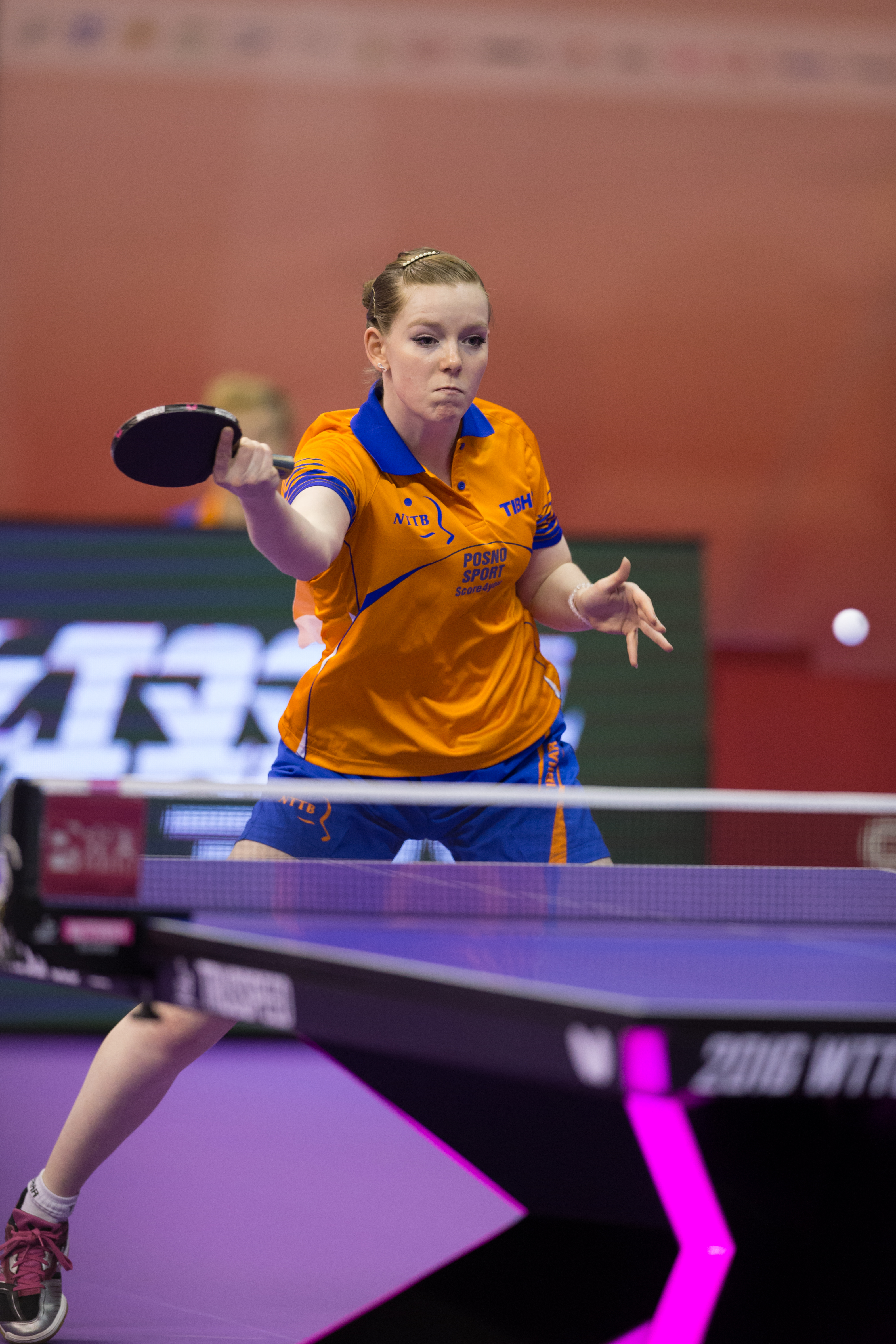 _K0K2208